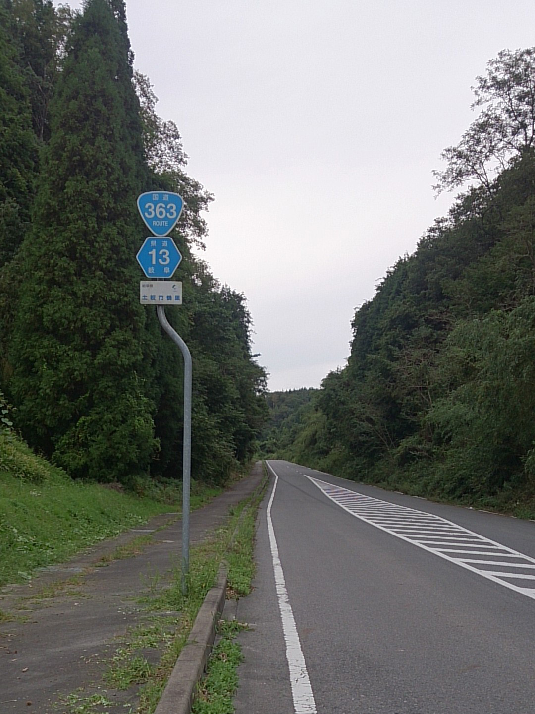 国道363号・岐阜県道13号豊田多治見線重複区間, 岐阜県土岐市鶴里町柿野